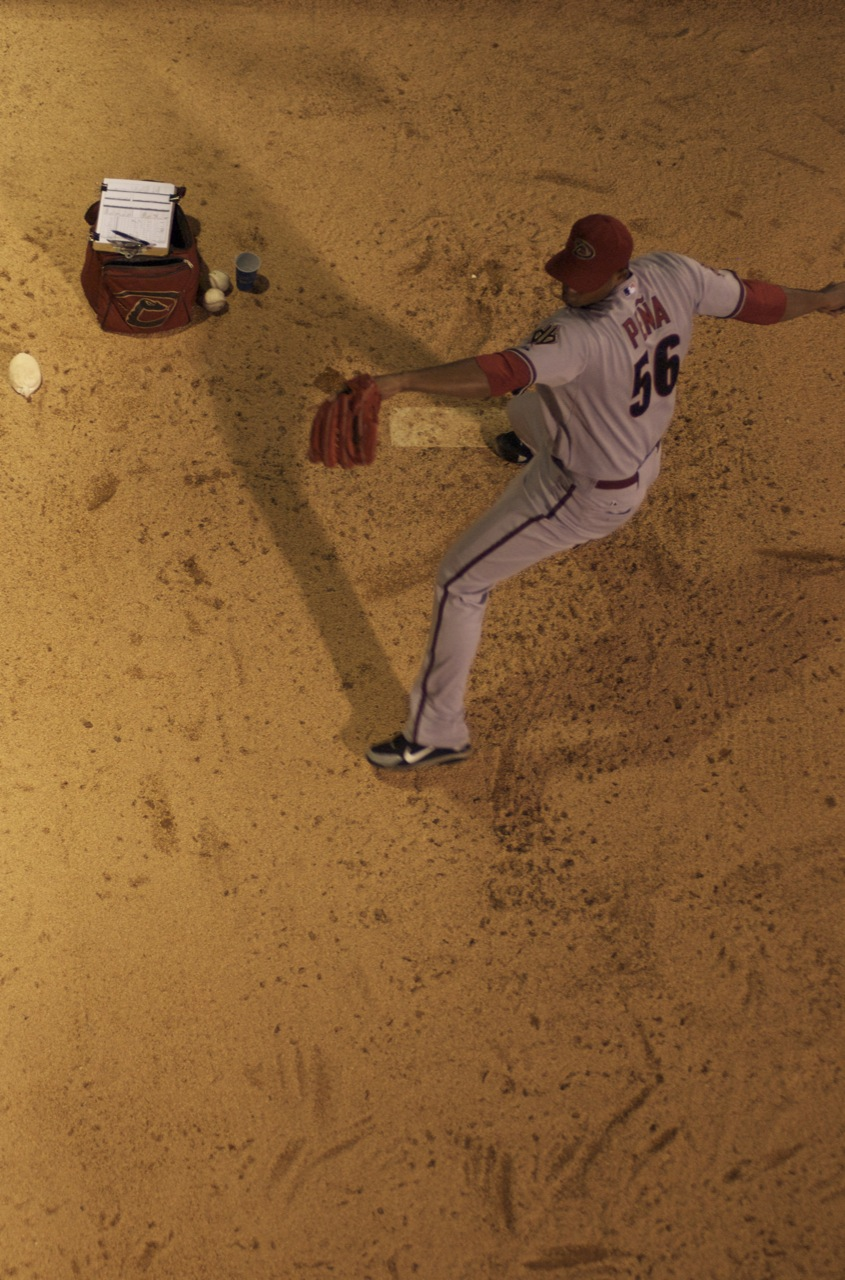 Tony Peña